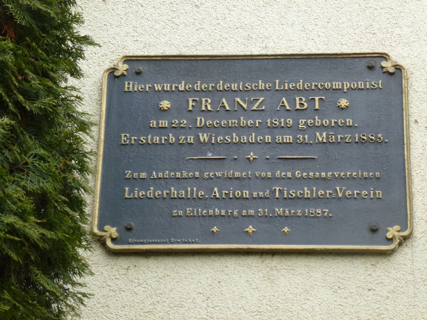 Tafel zur Erinnerung an Franz Abt in Eilenburg